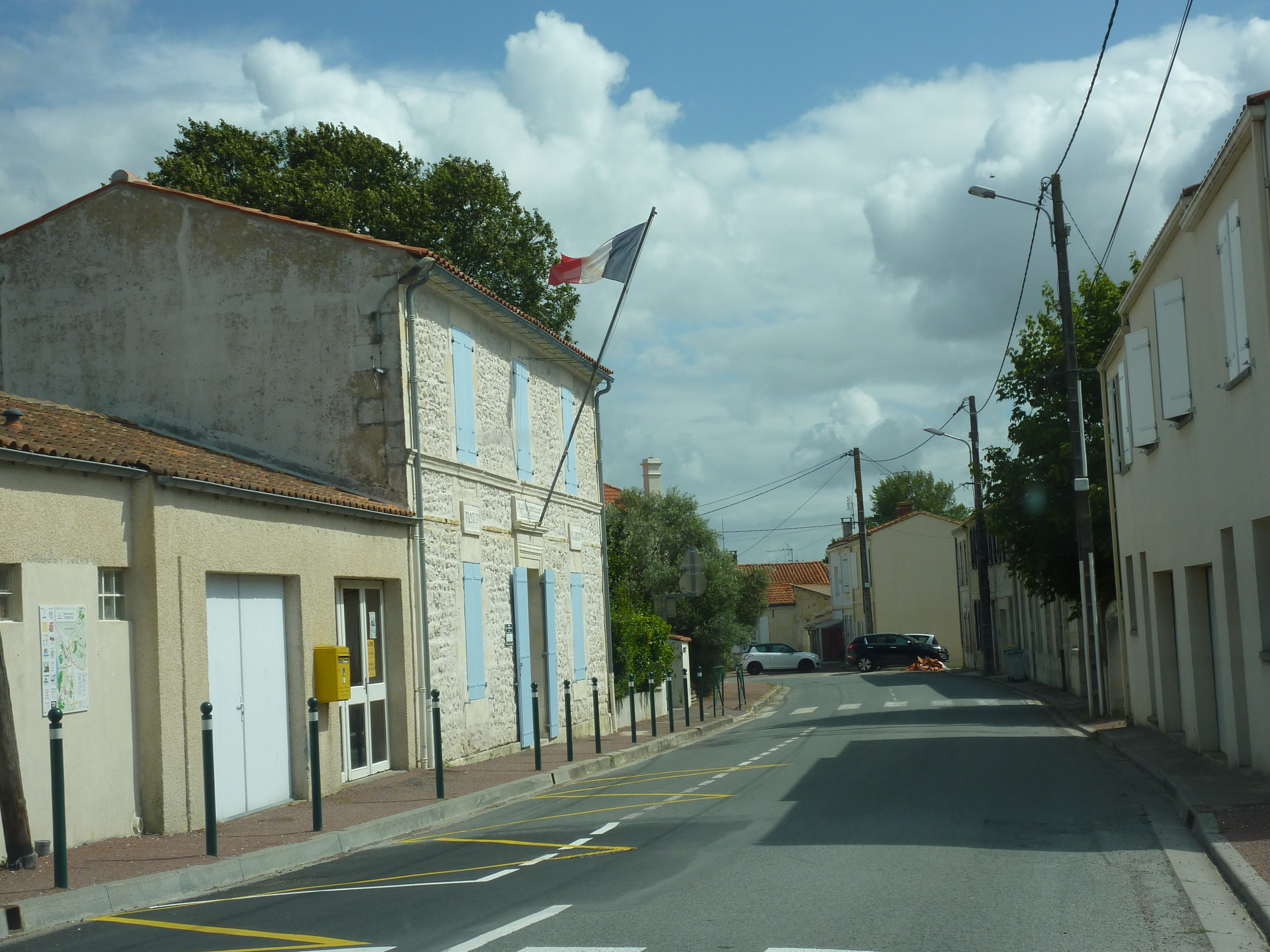 Mairie-école de Vergeroux en juillet 2012. Charente-Maritime, Poitou-Charentes, France, Europe.